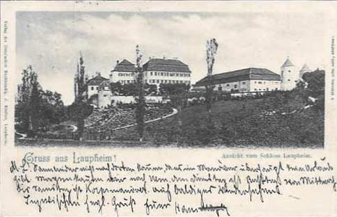 PD AK Laupheim, gelaufen 1907. Bild höchstwahrscheinlich von vor 1906, als Postkarten mit ungeteilter Rückseite außer Gebrauch kamen.